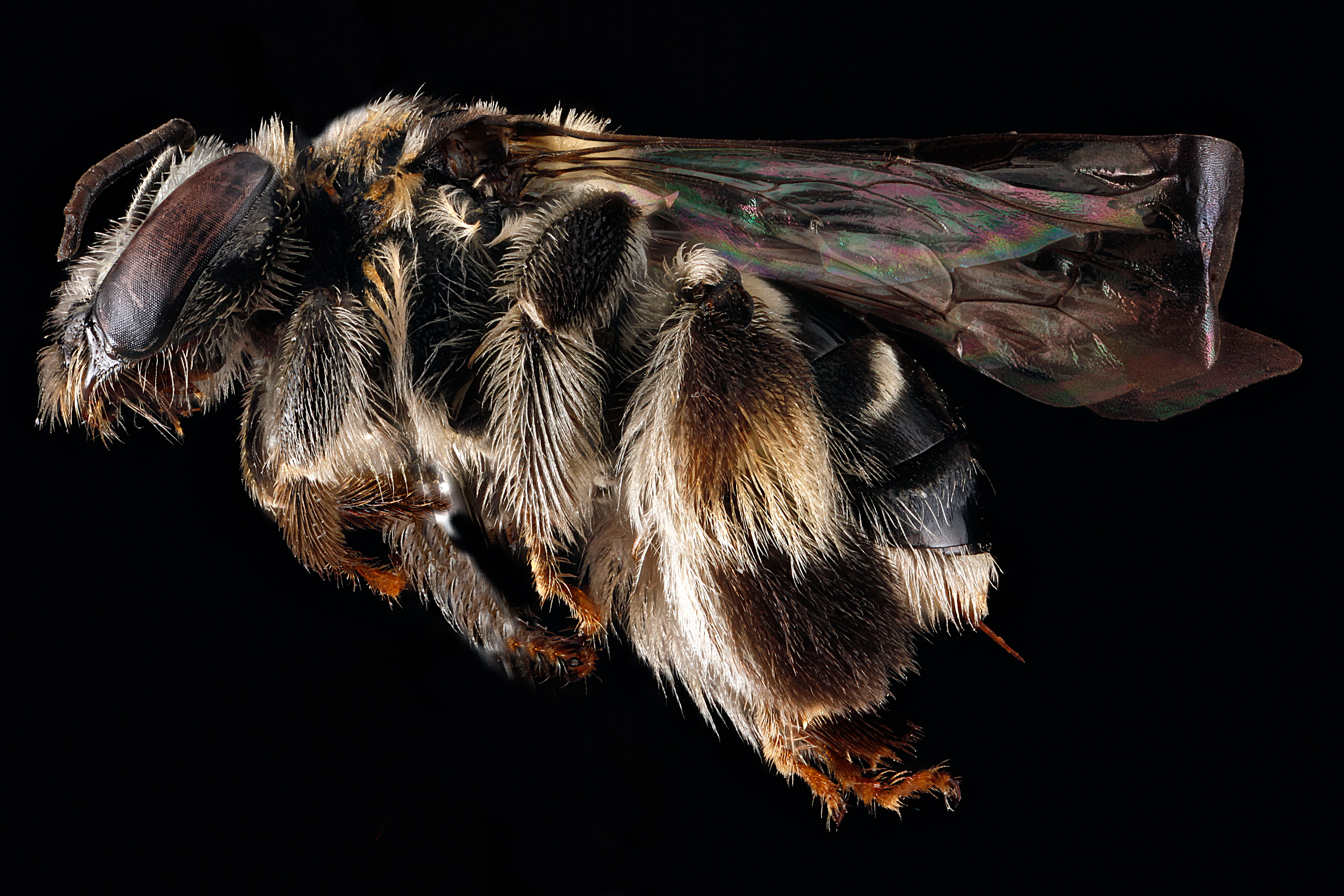 Exomalopsis pulchella, female, Cuba, GTMO June 2011